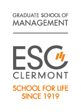 Logo du Groupe ESC Clermont.